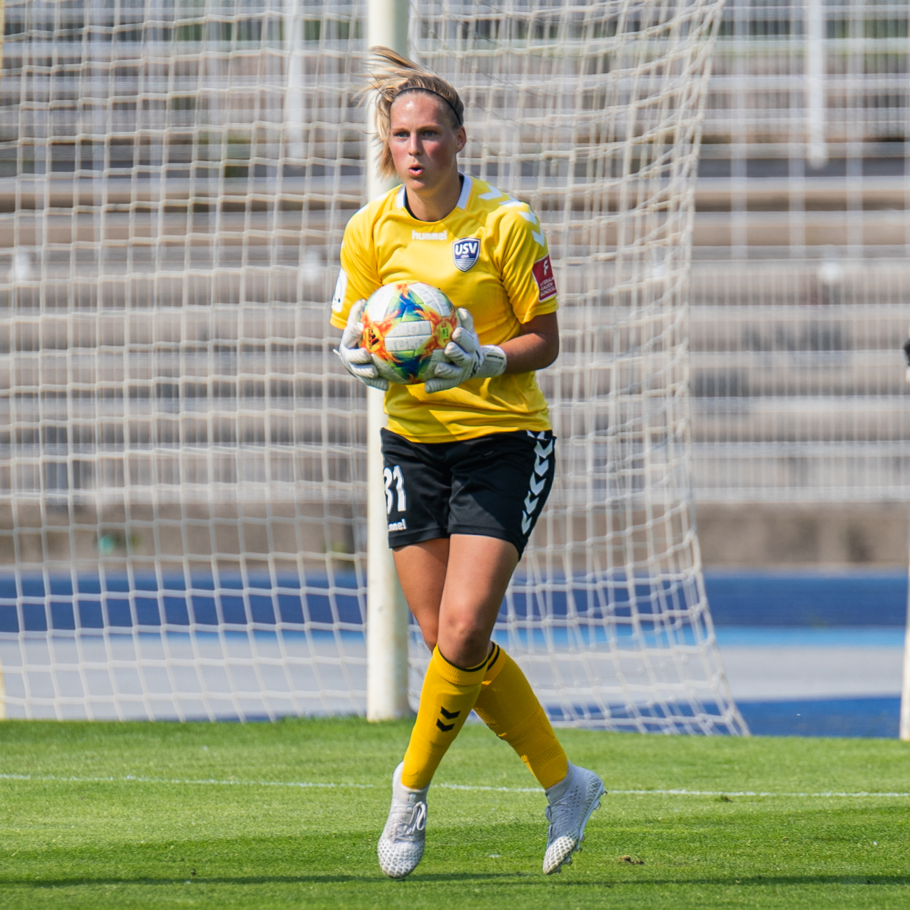 Fußball, Flyeralarm Frauen-Bundesliga, FF USV Jena - Bayer 04 Leverkusen; Inga Schuldt (FF USV Jena, 31, Torwart); Freisteller, Einzelbild, Aktion, action